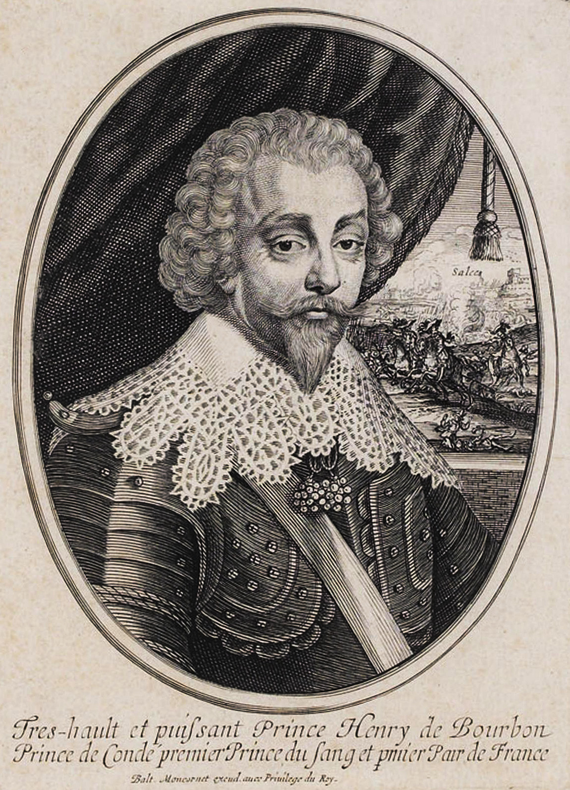 Porträt Henris II. de Bourbon, Fürst von Condé